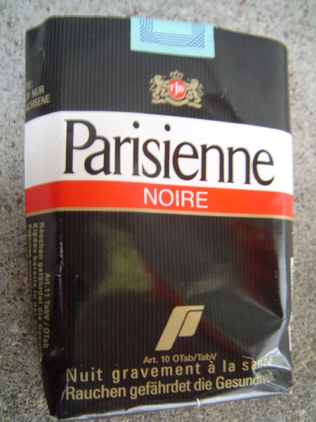 Leere Soft-Box von Parisienne Noire-Zigaretten